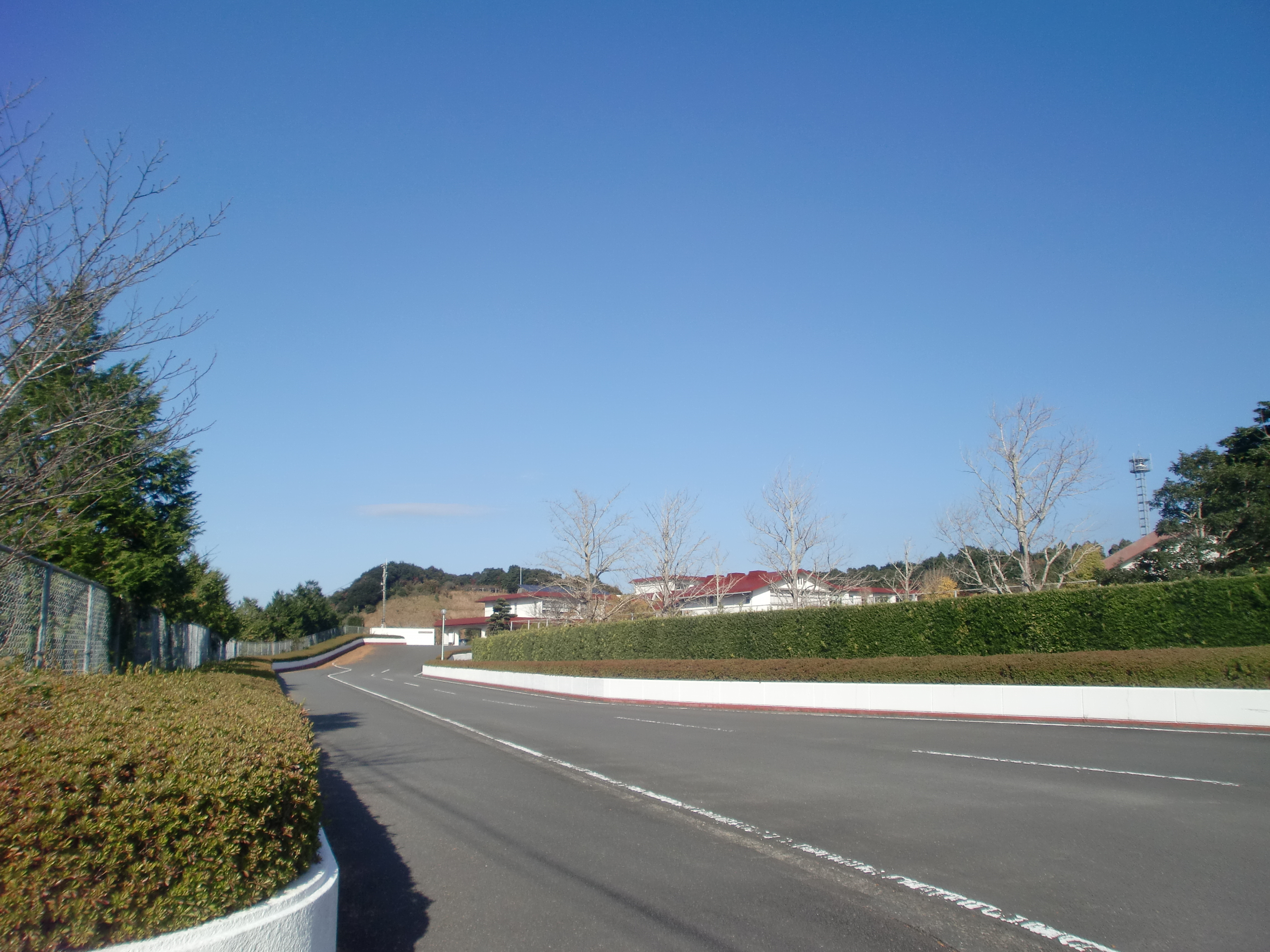 鹿児島県立加世田高等学校を入り口から校門方面を望む